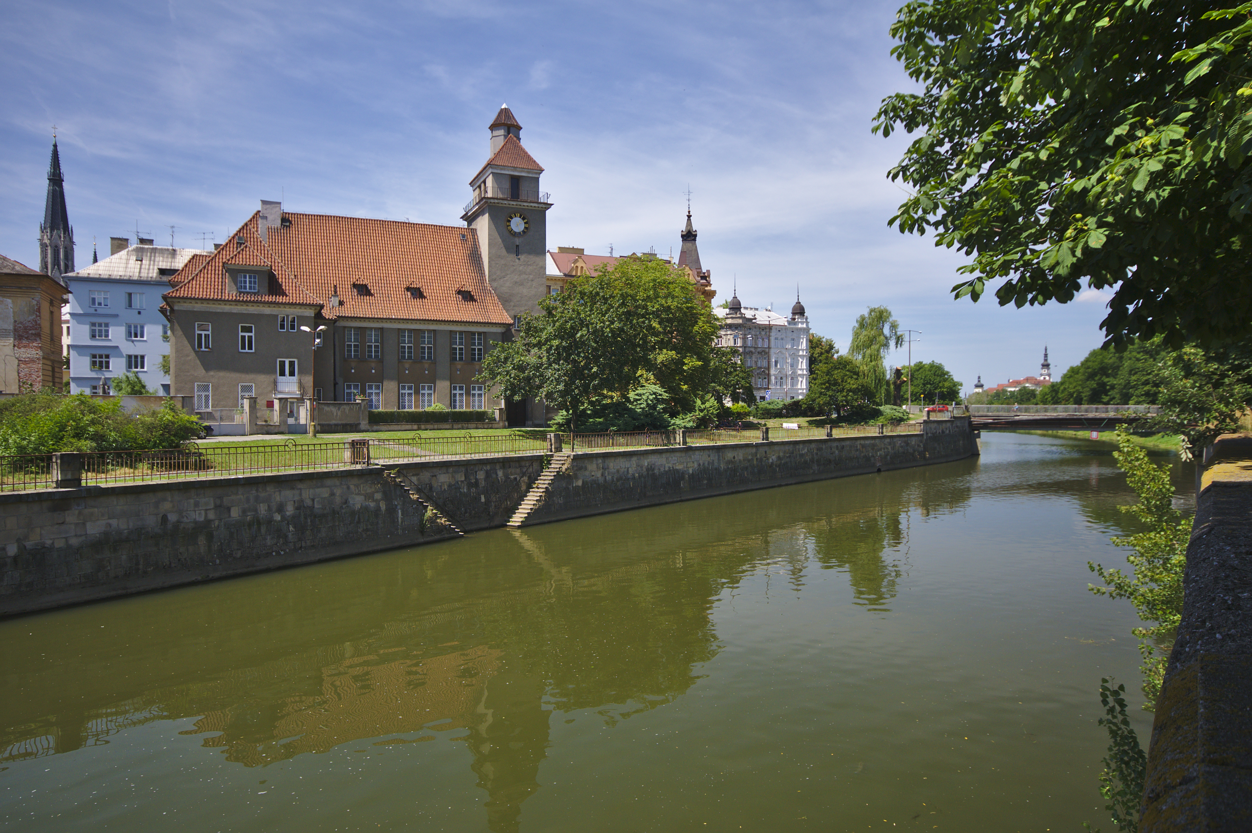 Kostel Českobratrské církve evangelické, Olomouc